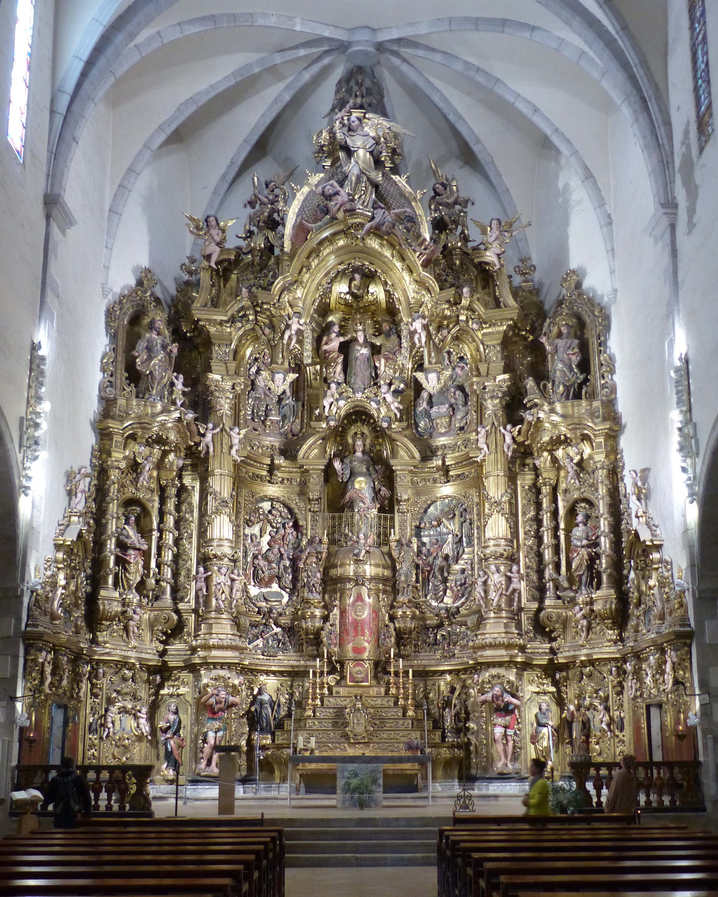 Cadaqués (Catalogne, province de Gérone), église Santa Maria, retable du maître-autel.